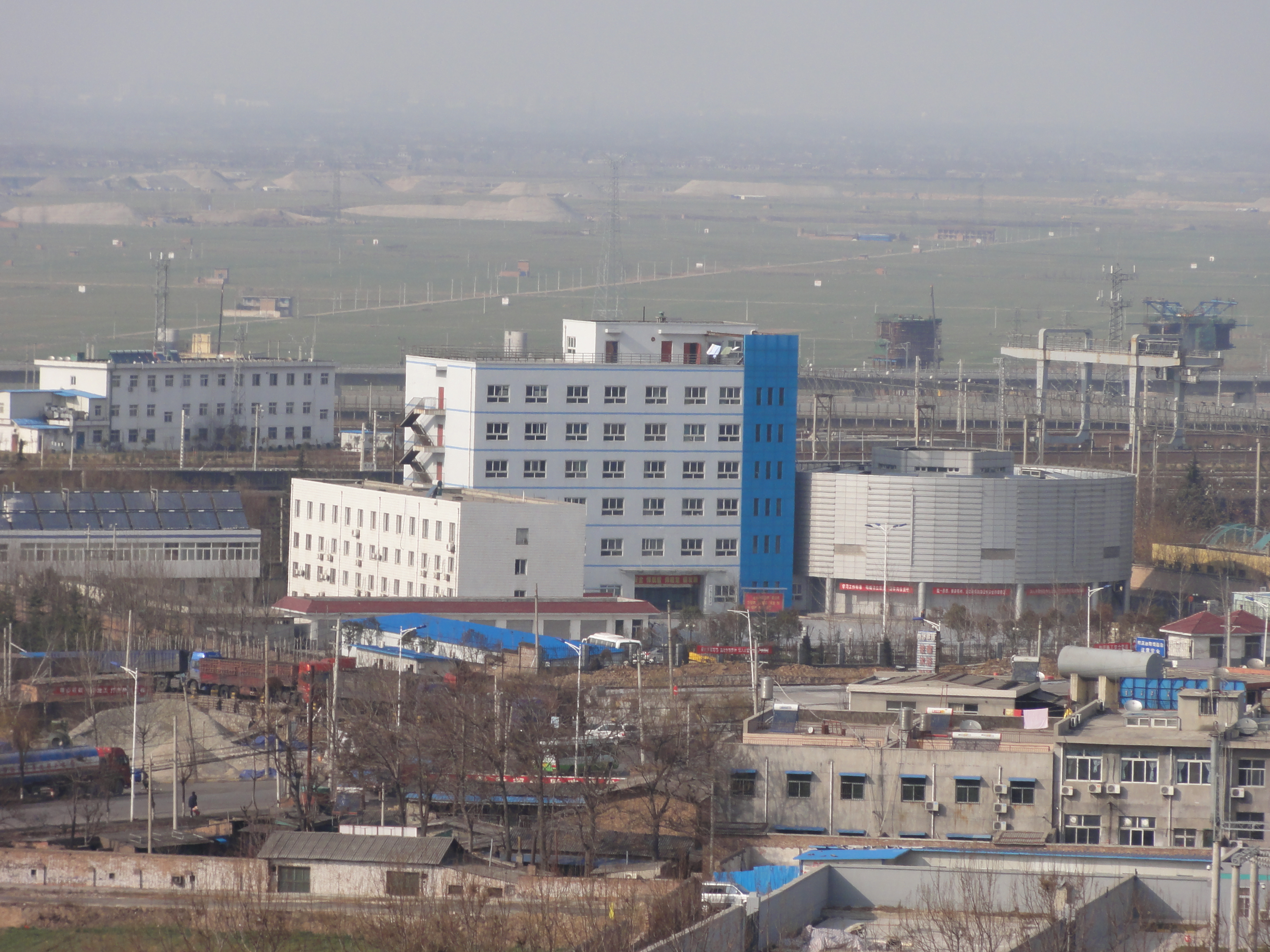 新丰镇编组站